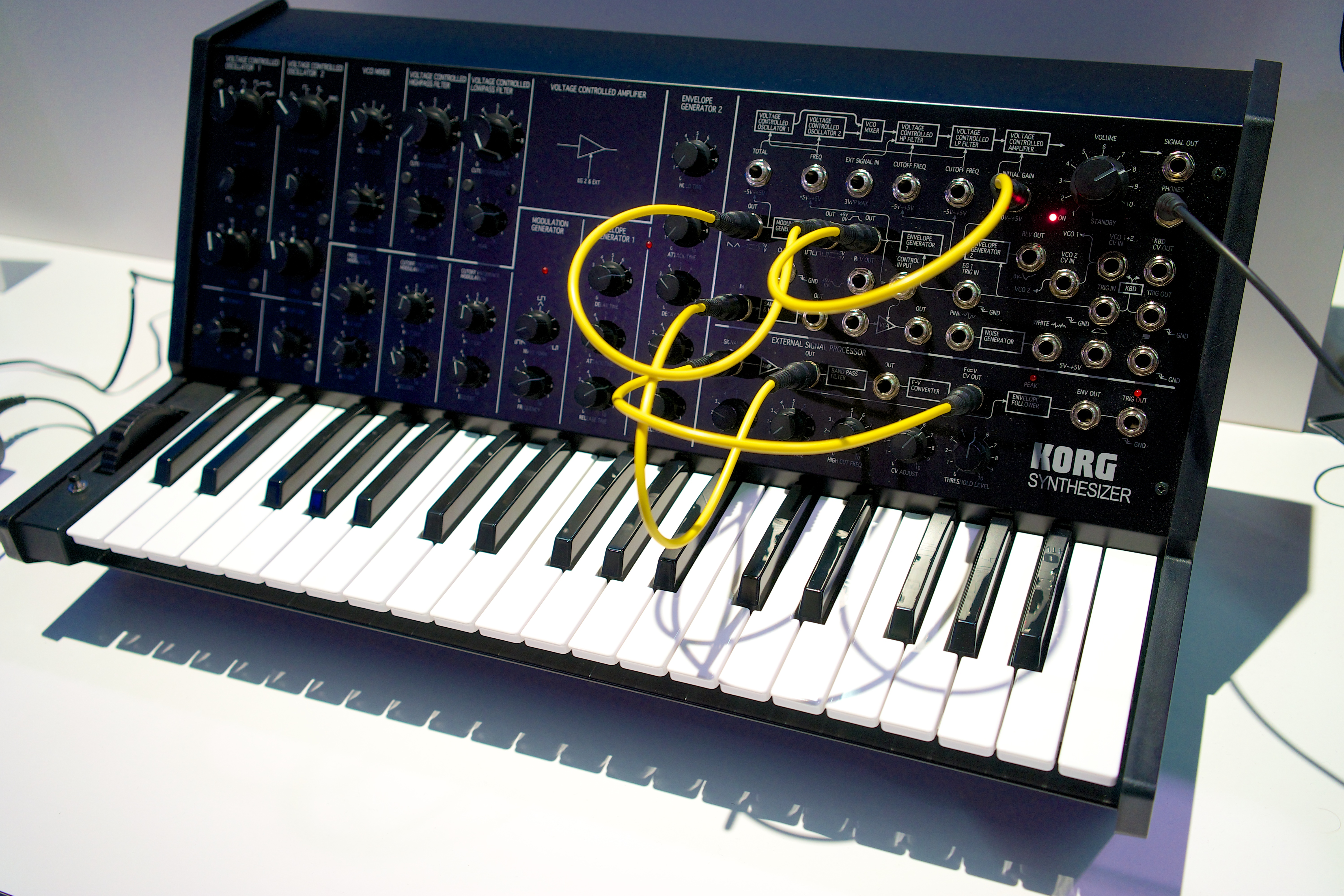 KORG MS-20 Kit